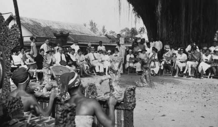 Foto. Een dansvoorstelling voor toeristen op Bali